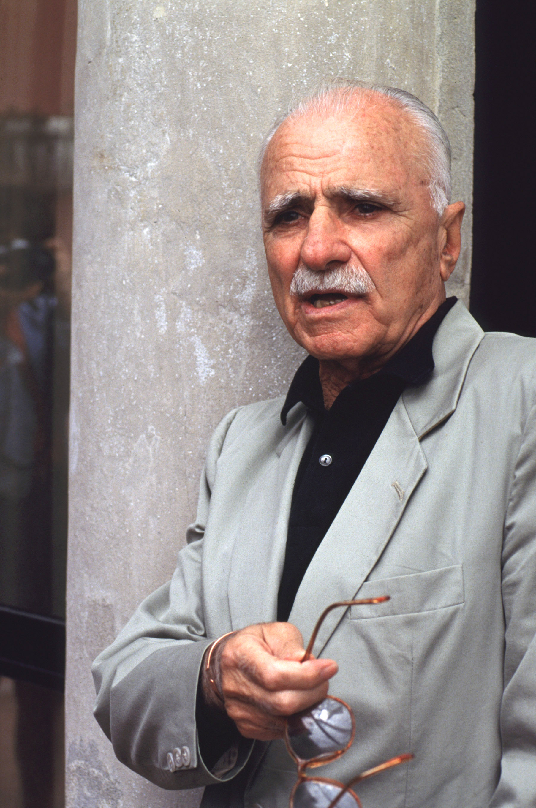 Il regista Mario Monicelli alla Mostra del cinema di Venezia del 1985